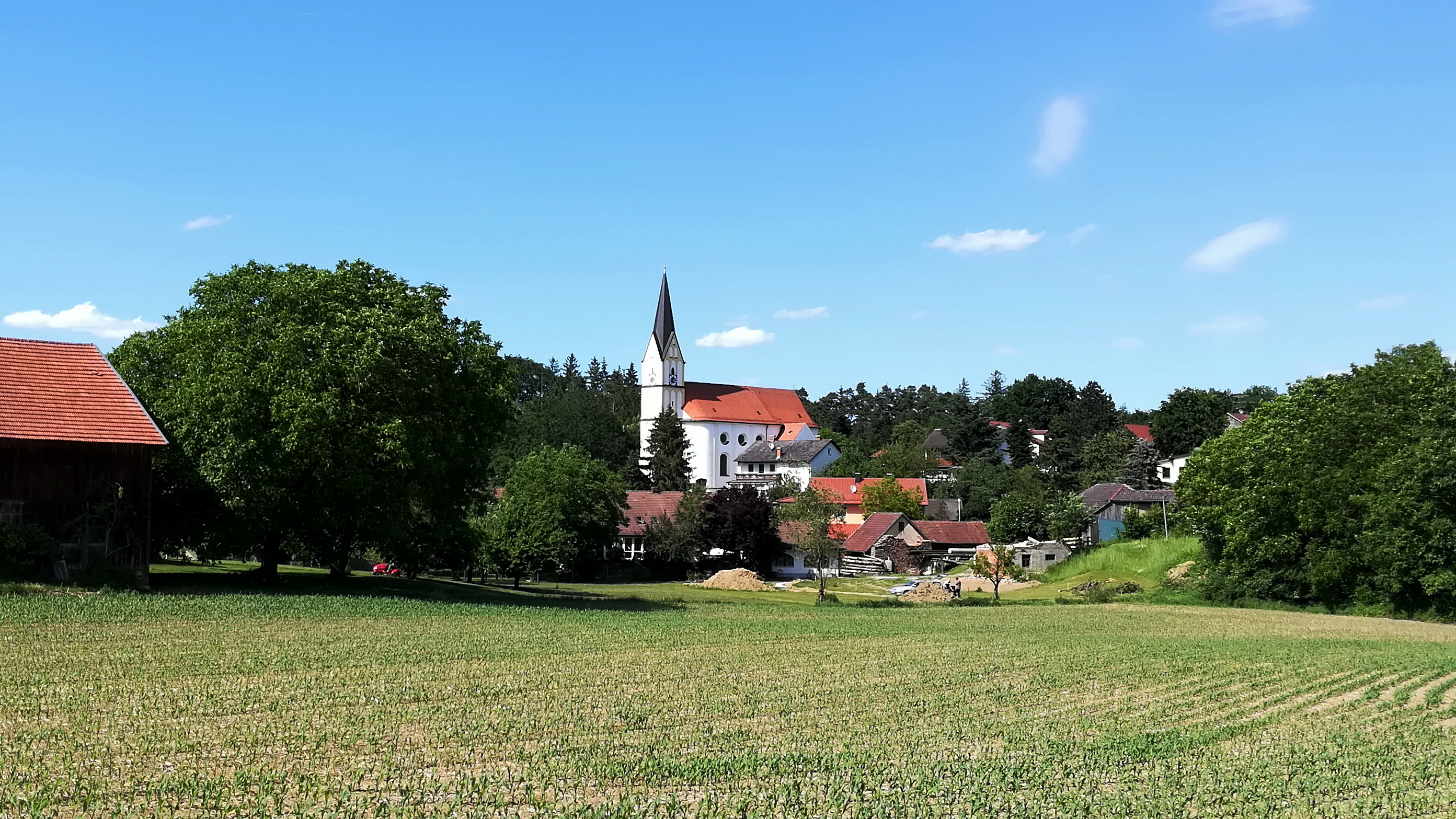 Oberotterbach ist ein Ortsteil der Stadt Rottenburg an der Laaber im niederbayerischen Landkreis Landshut. Bis 1972 bildete es eine selbstständige Gemeinde.